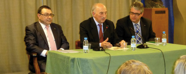 Francesc Gras i Salas fent una conferència a l'entitat Amics de Reus